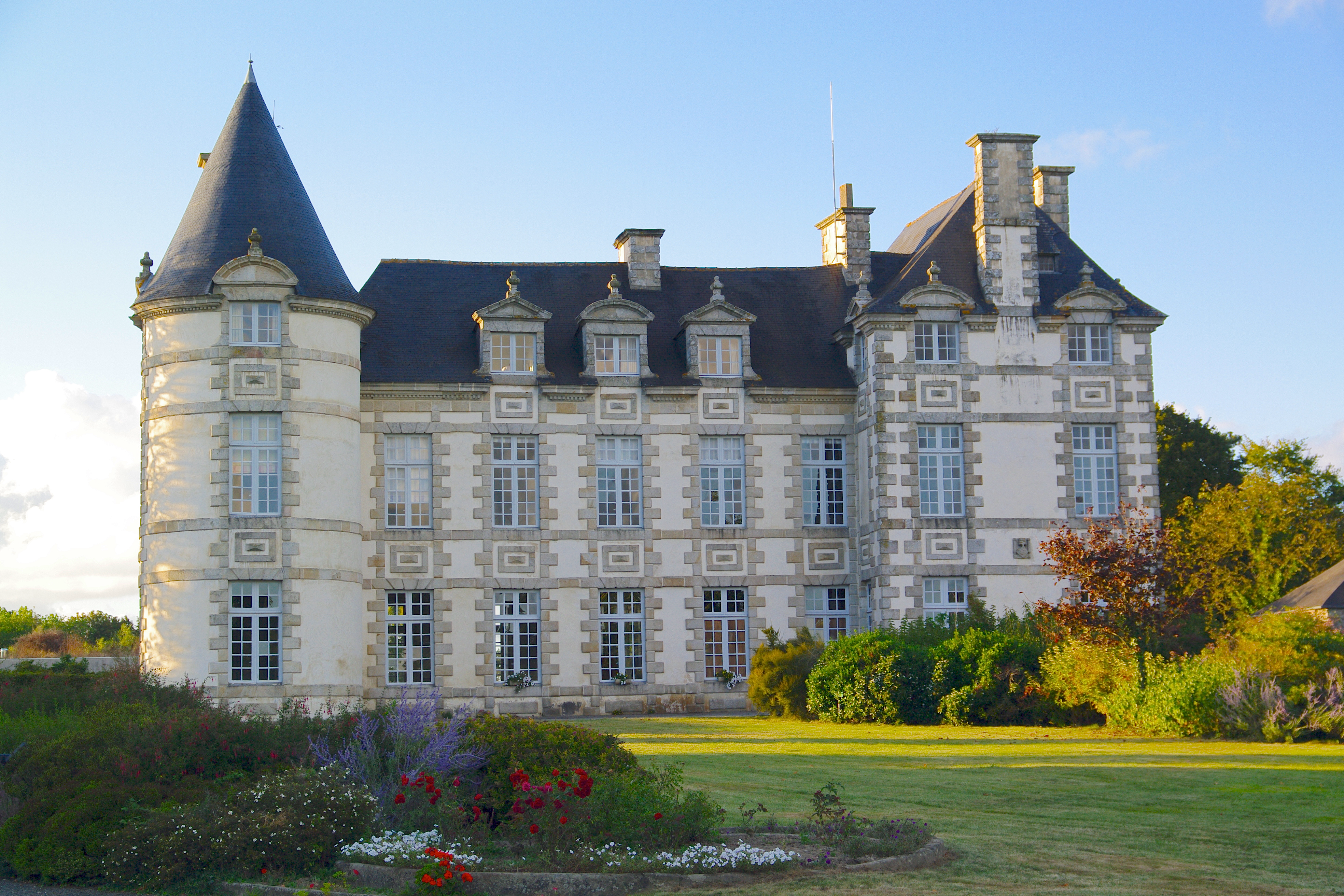 Château de Beaubois, (Inscription, 1926) .